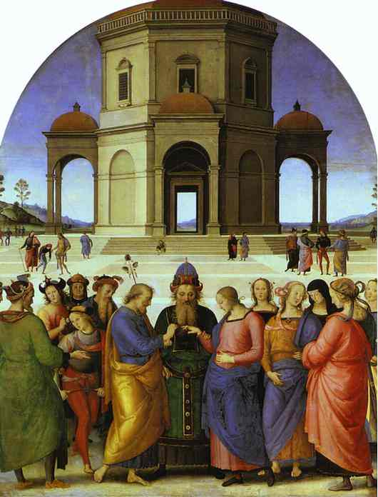 Matrimônio da Virgem Maria